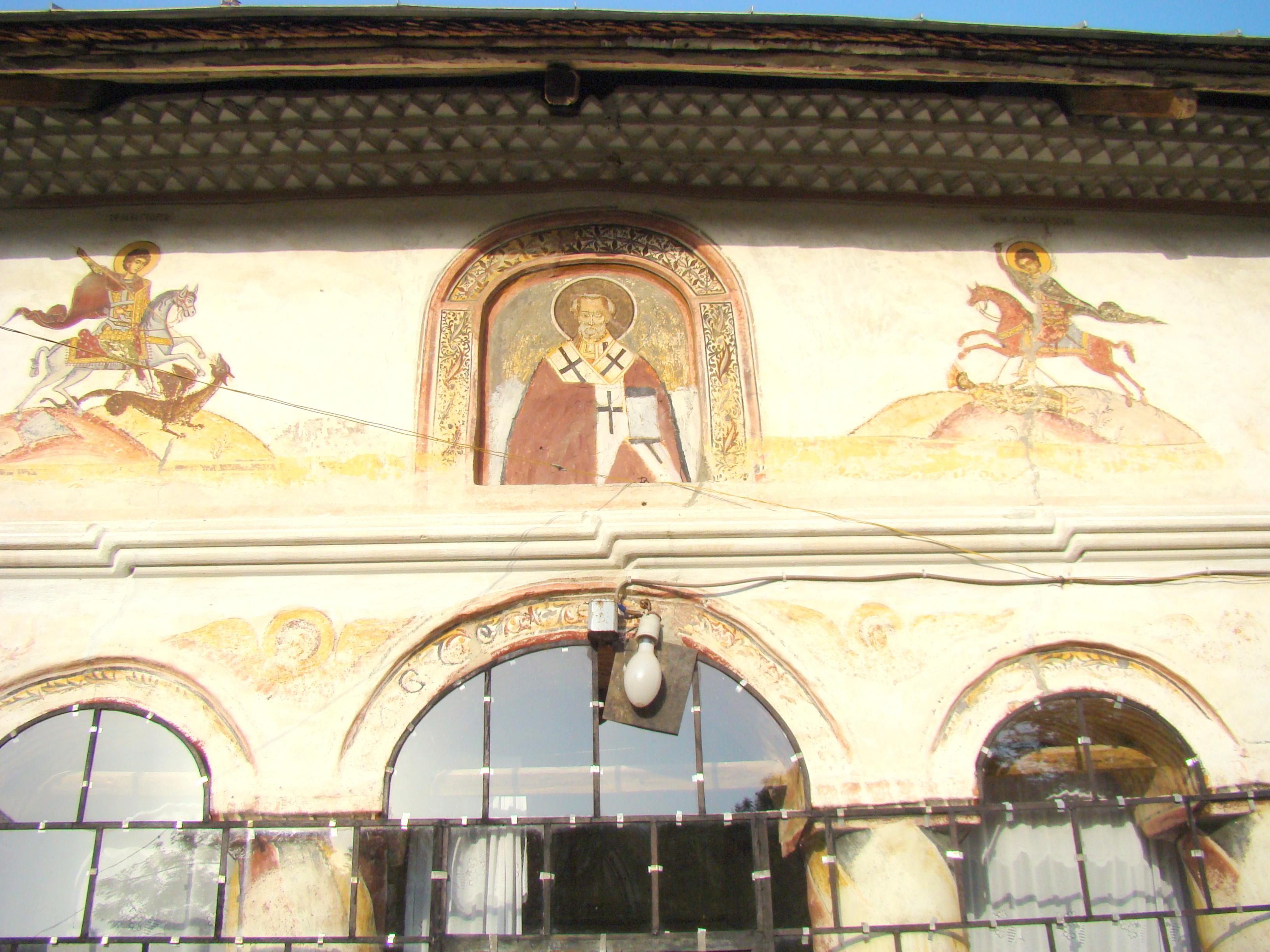 Biserica „Sfântul Nicolae” din satul Bărbătești, cătunul Vătășești, județul Vâlcea